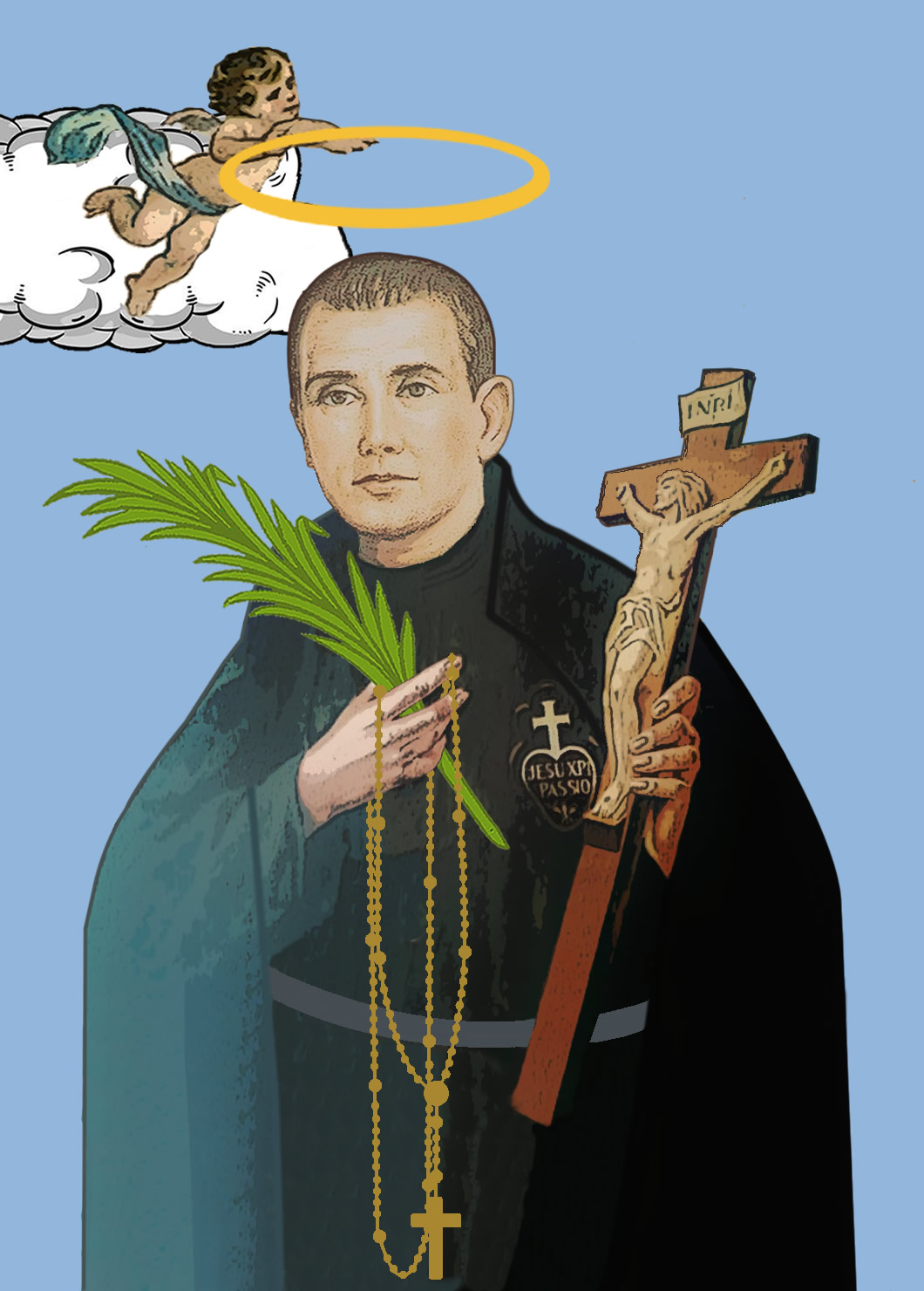 San Inocencio de la Inmaculada Presbítero y Mártir Pasionista